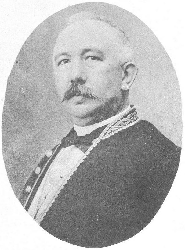 Retrato de Germán Gamazo